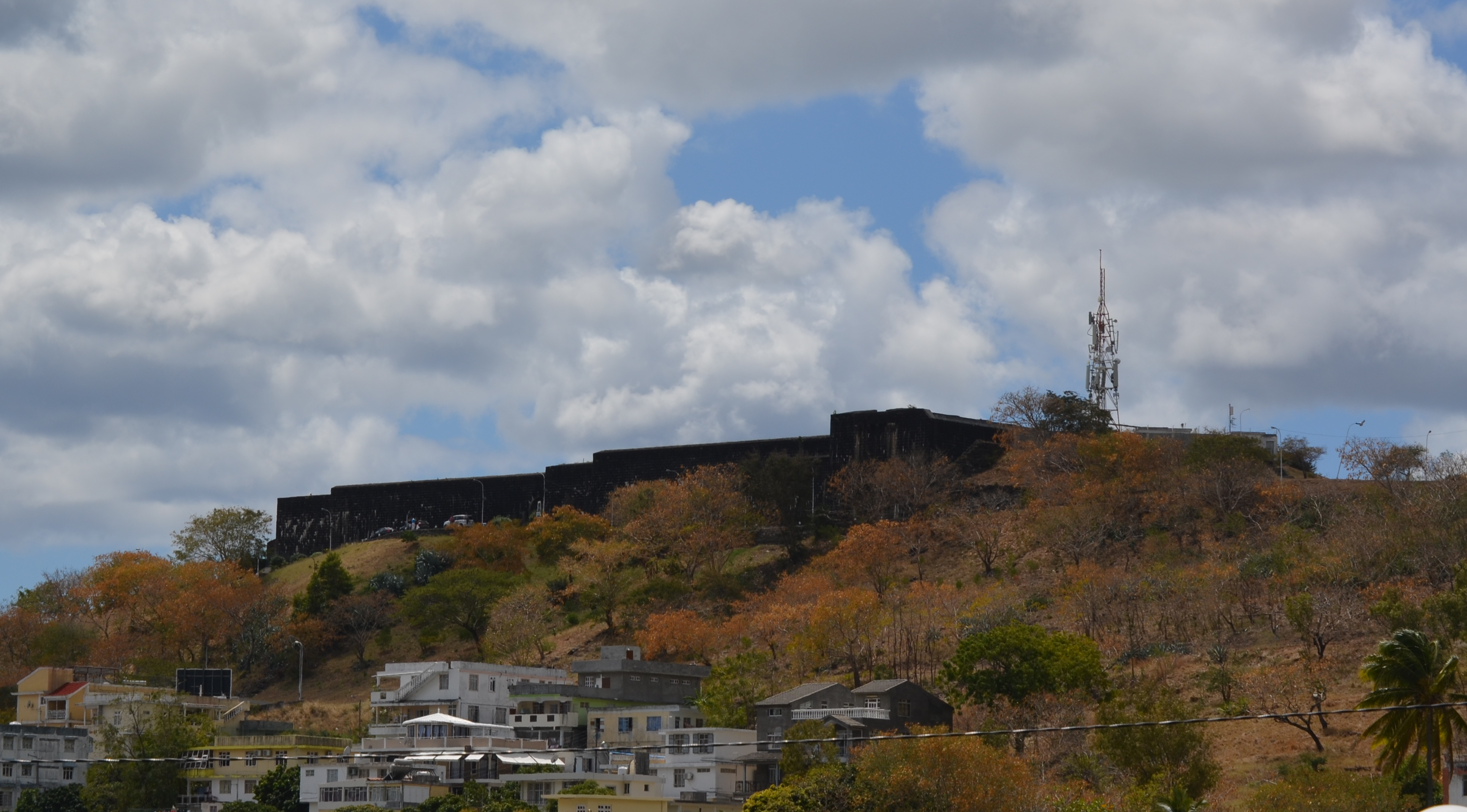 Port Louis, Fort Adelaide